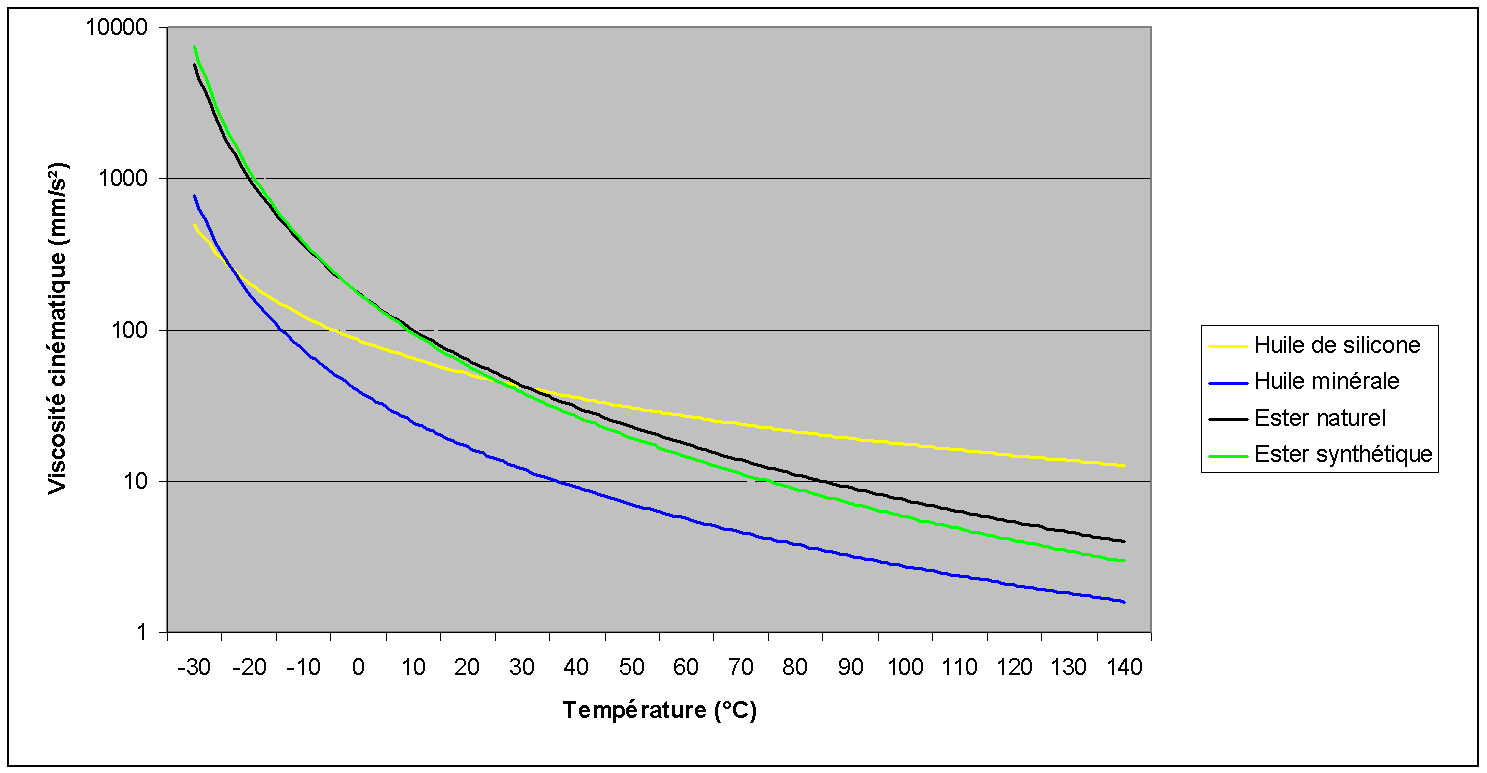 Viscosité cynématique de différents types d'huiles de transformateurs.